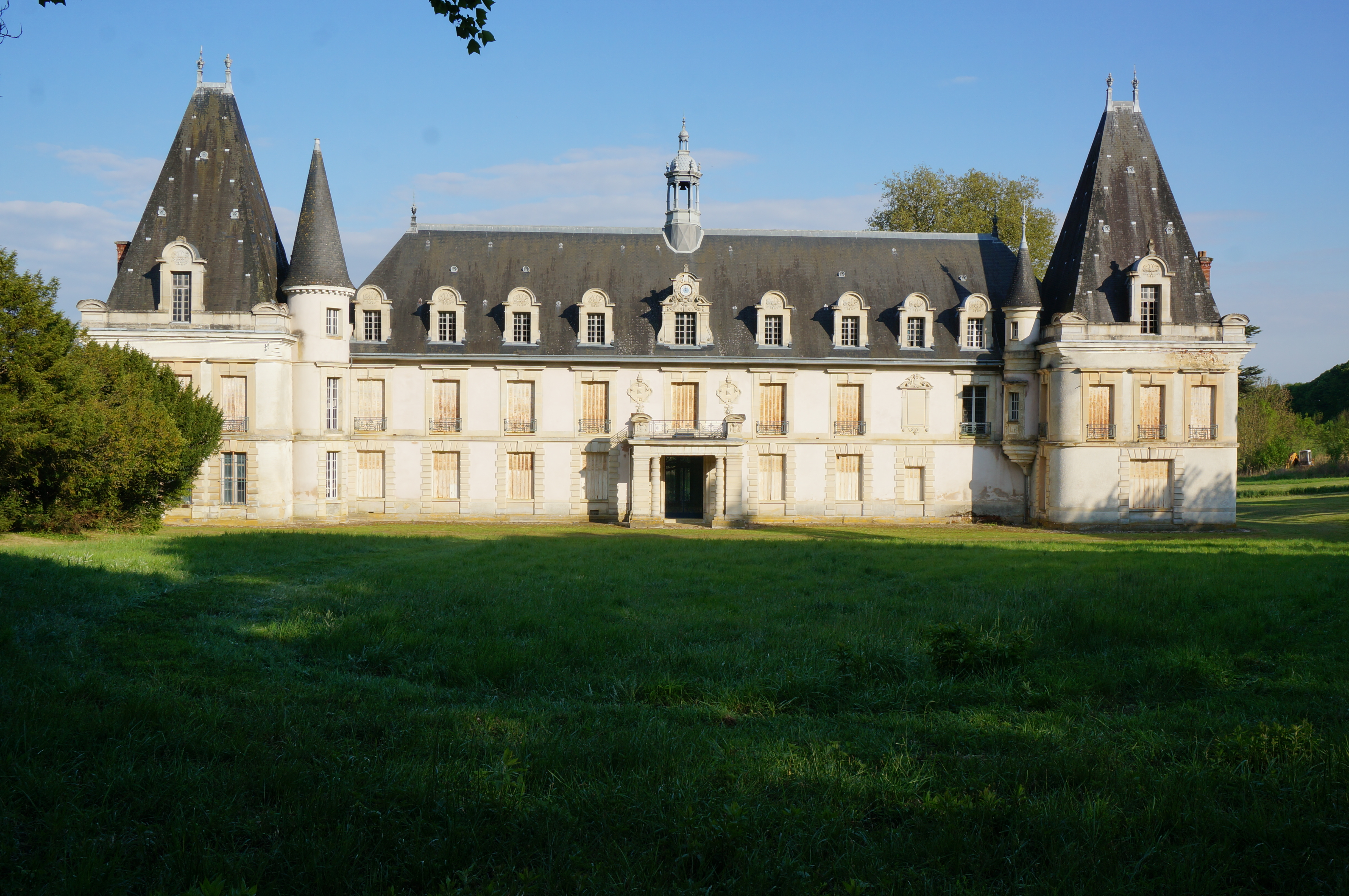 visible à Congy.